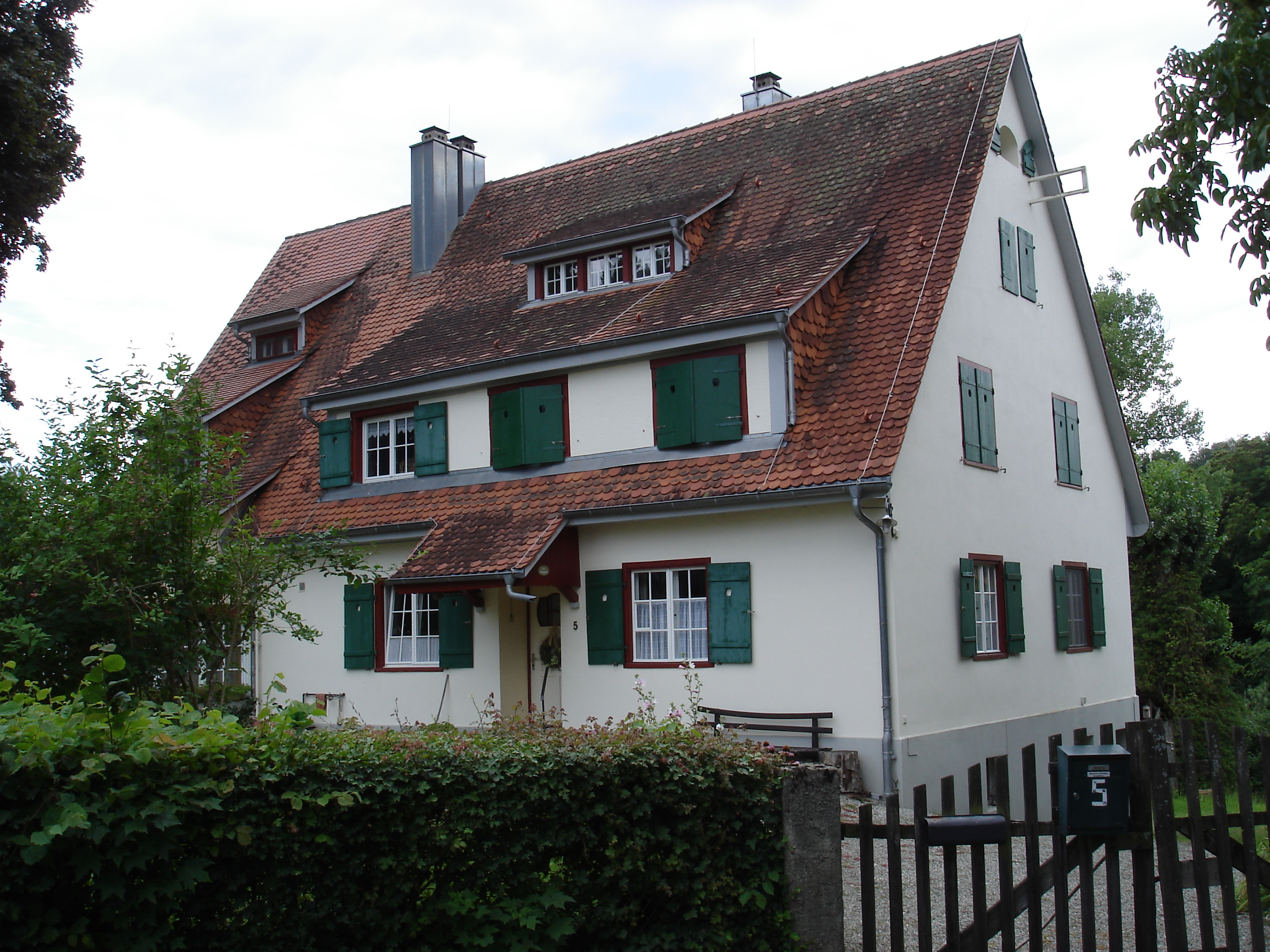 Ludwig Finckhs Wohnhaus in Gaienhofen